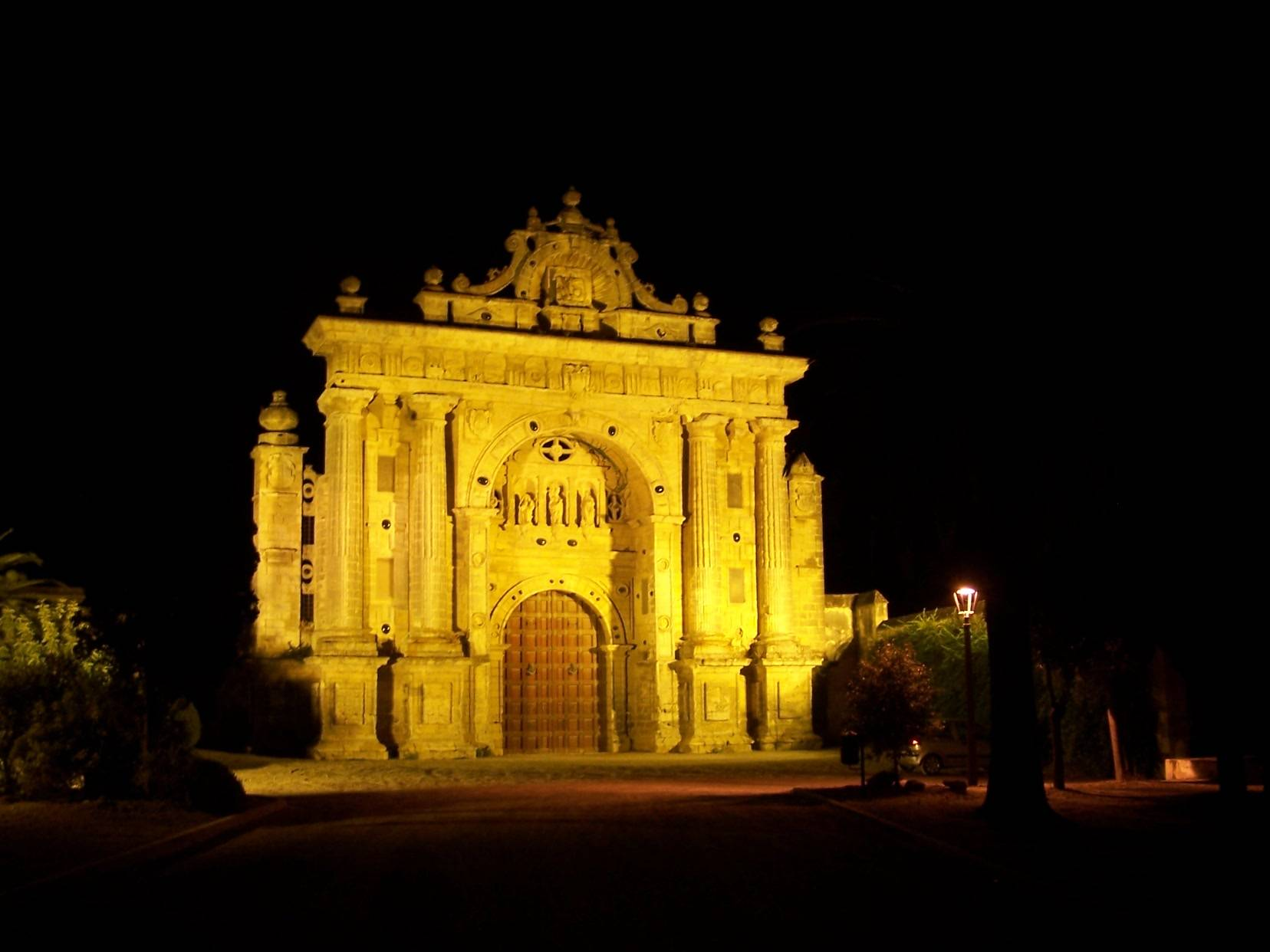 Cartuja de Jerez de la Frontera Fachada